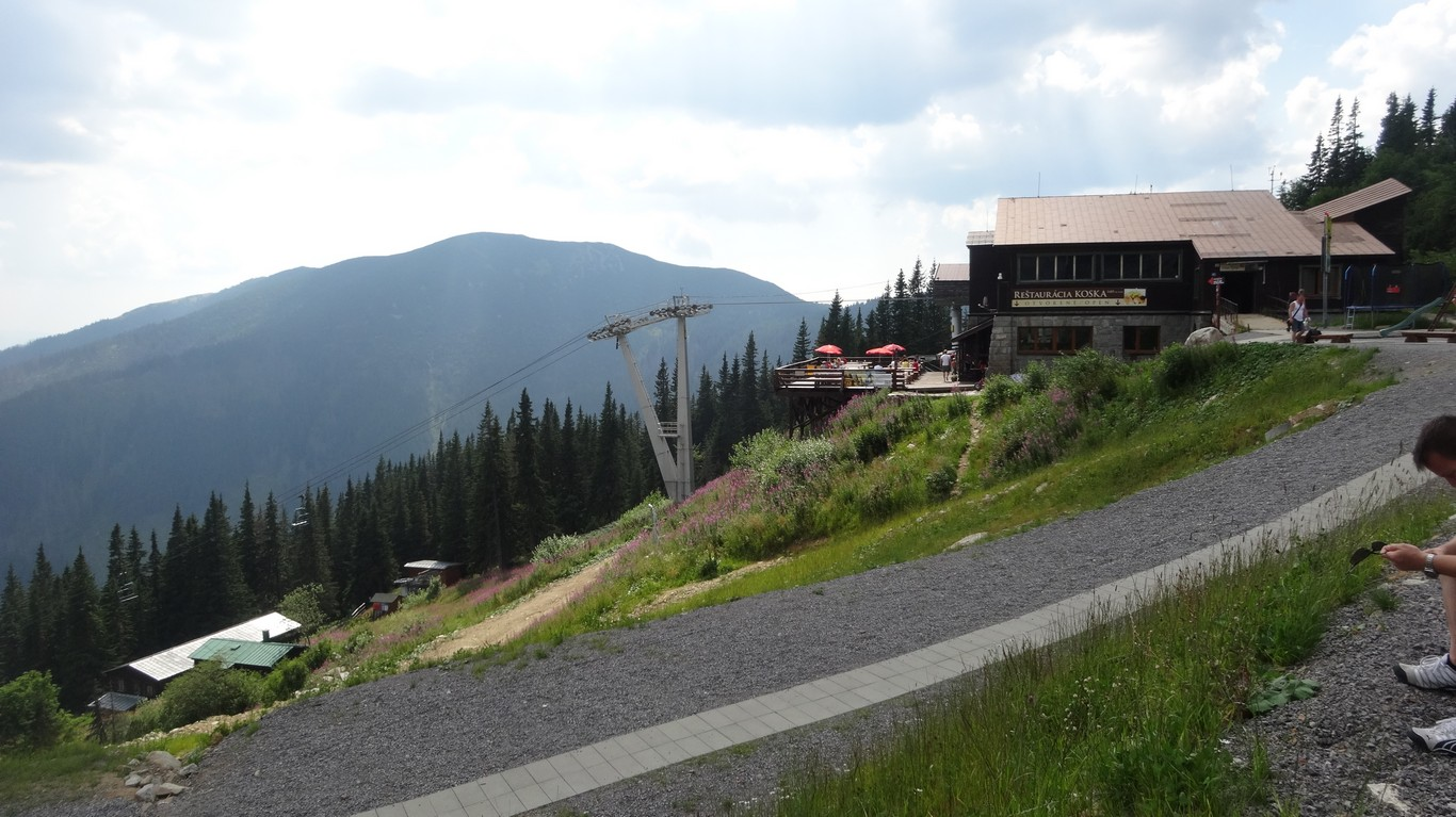 Hotel Kosodrevina od lanovky